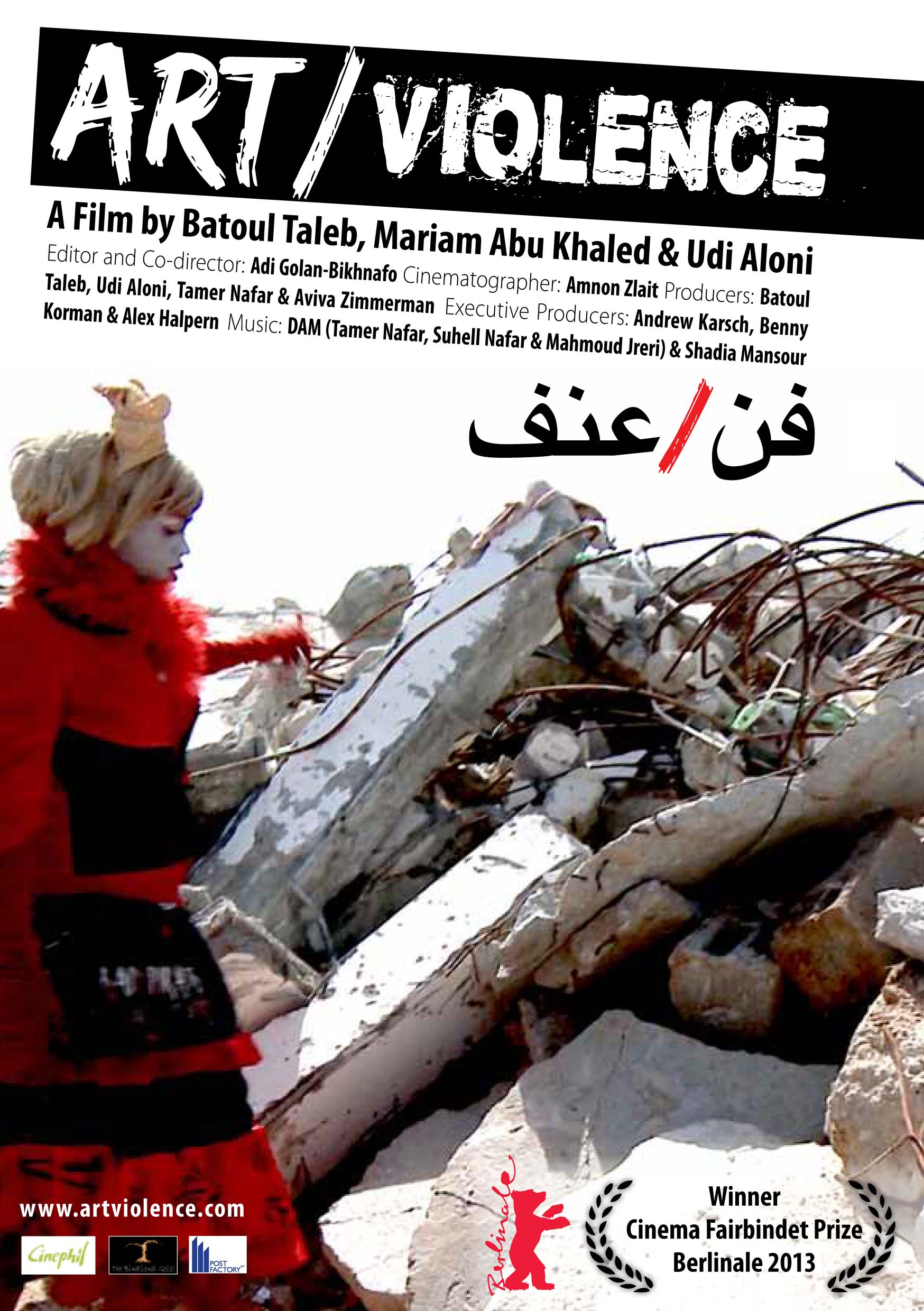 אודי אלוני הוא במאי, סופר ואמן חזותי ופעיל שמאל רדיקלי ישראלי., בנה של שולמית אלוני פוסטר של ArtViolence